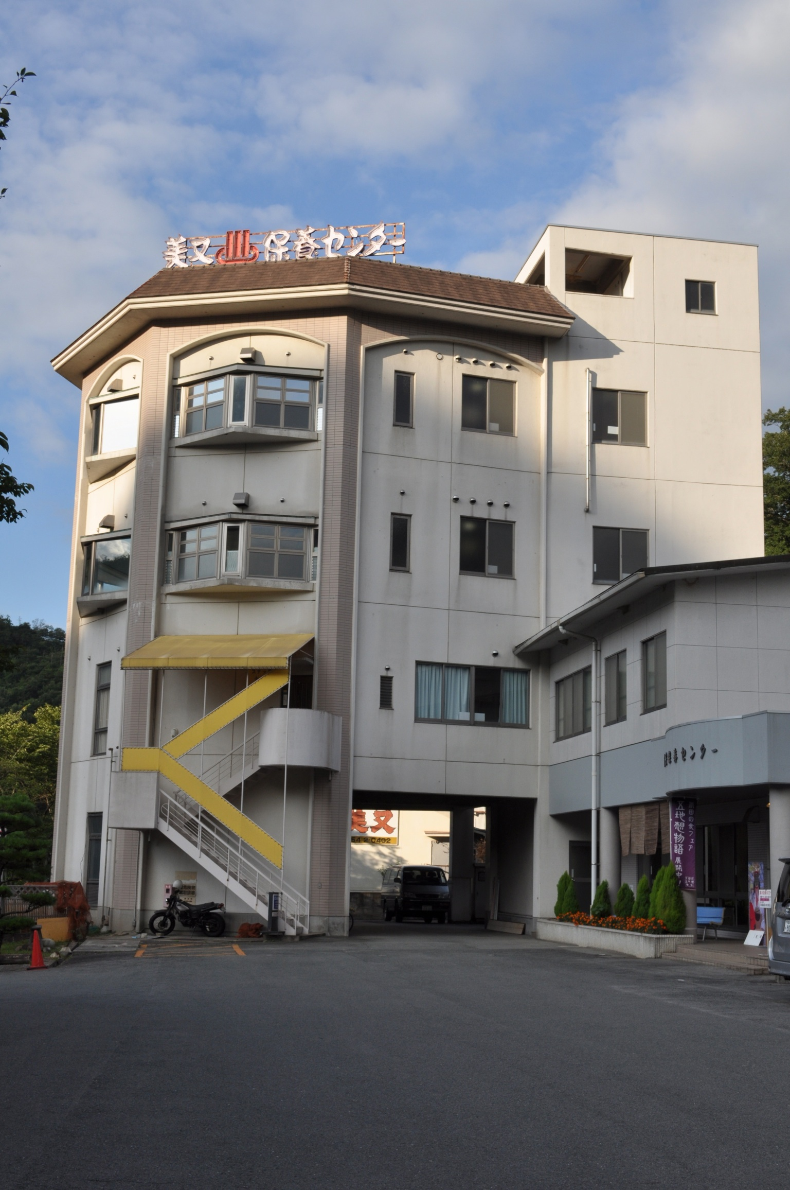 美又保養センター（美又温泉）